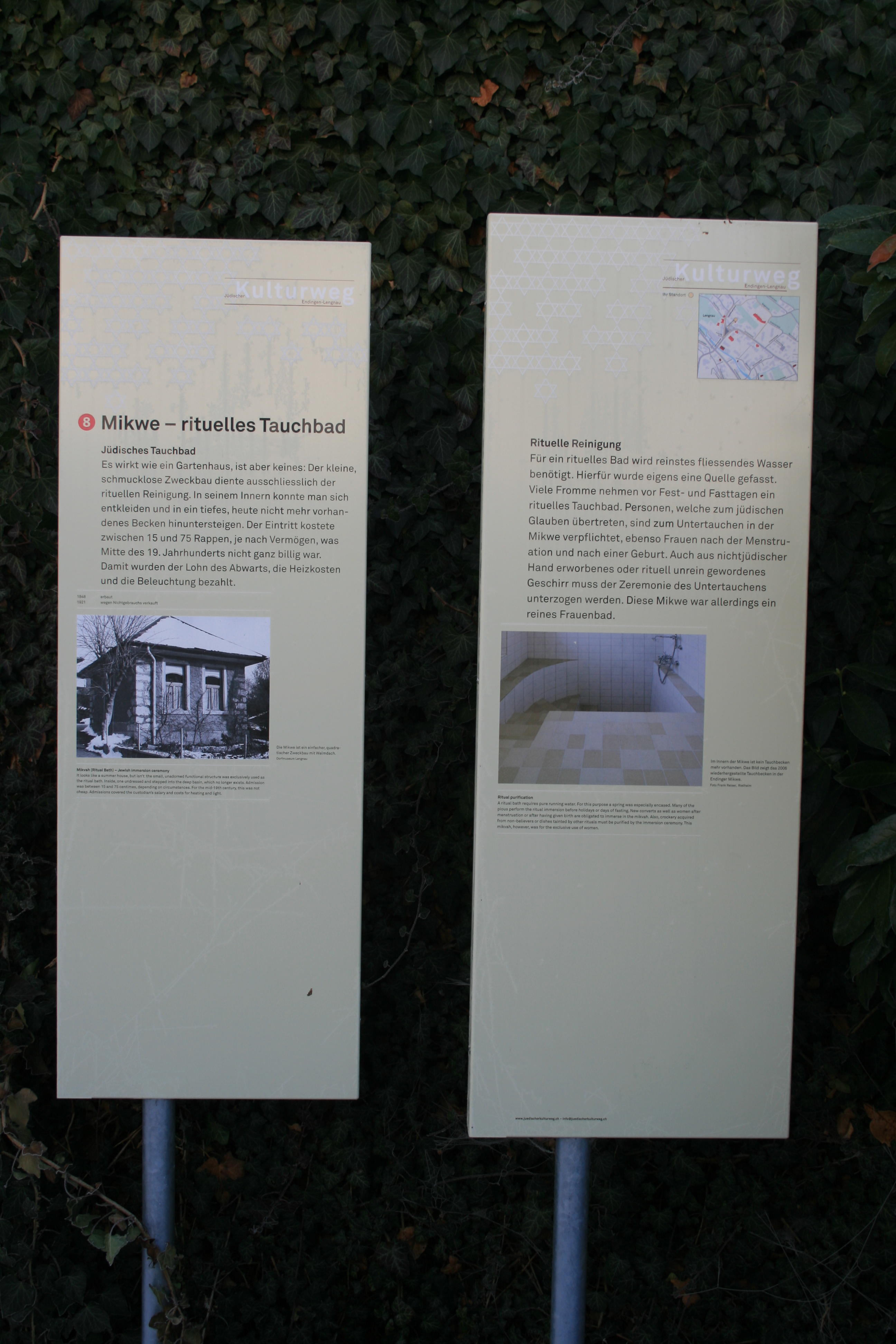 Lengnau AG